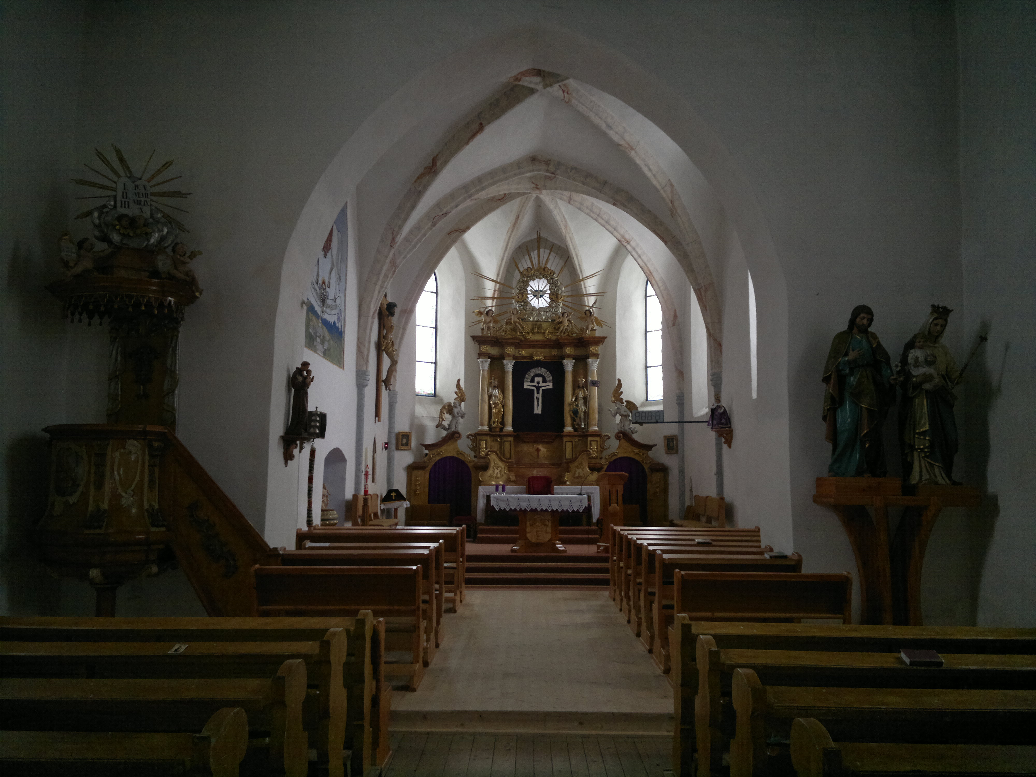 Kostel sv. Jakuba Staršího ve Velké Losenici